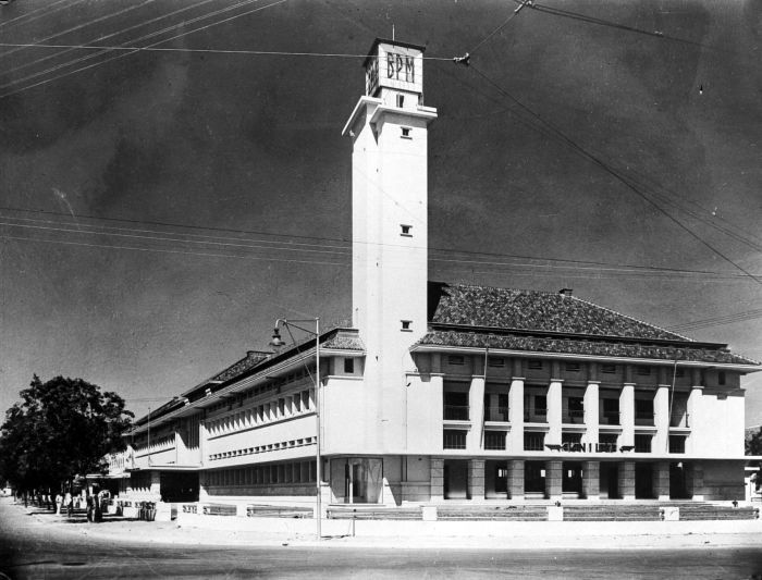 Repronegatief. Hoofdgebouw van de Bataafse Petroleum Maatschappij te Batavia